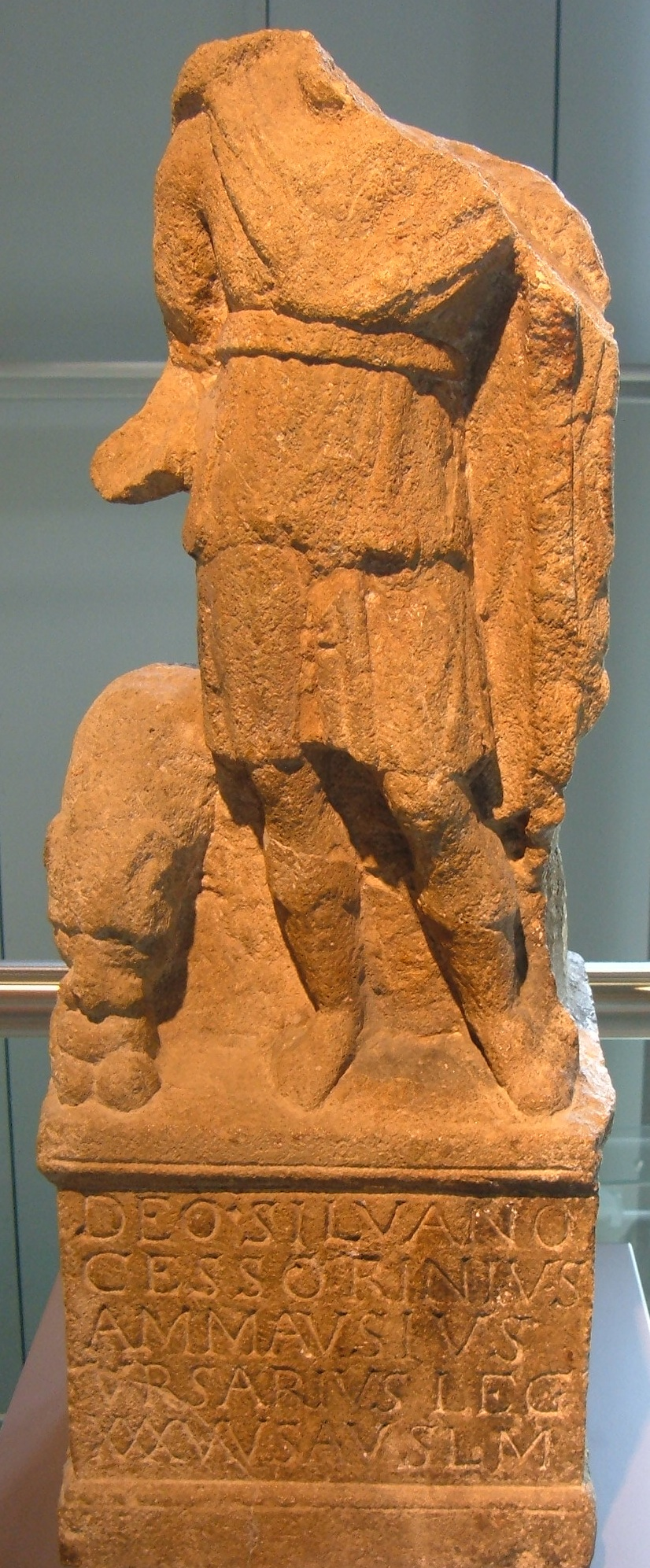 Estátua de Silvano em Xanten